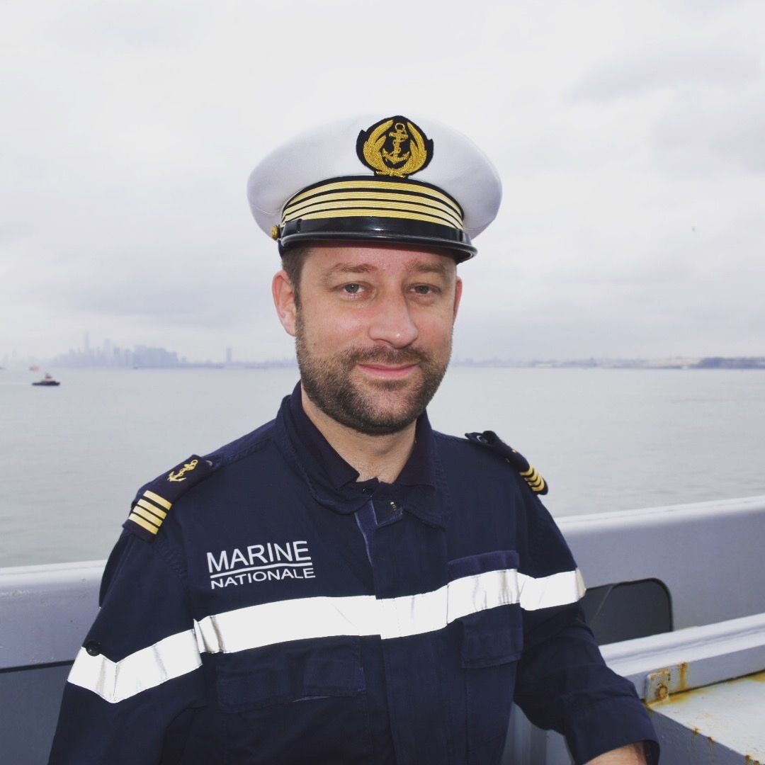 Loïc Hervé